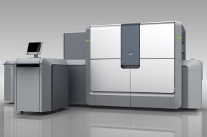 Digital-Drucksystem Océ ColorStream 10000